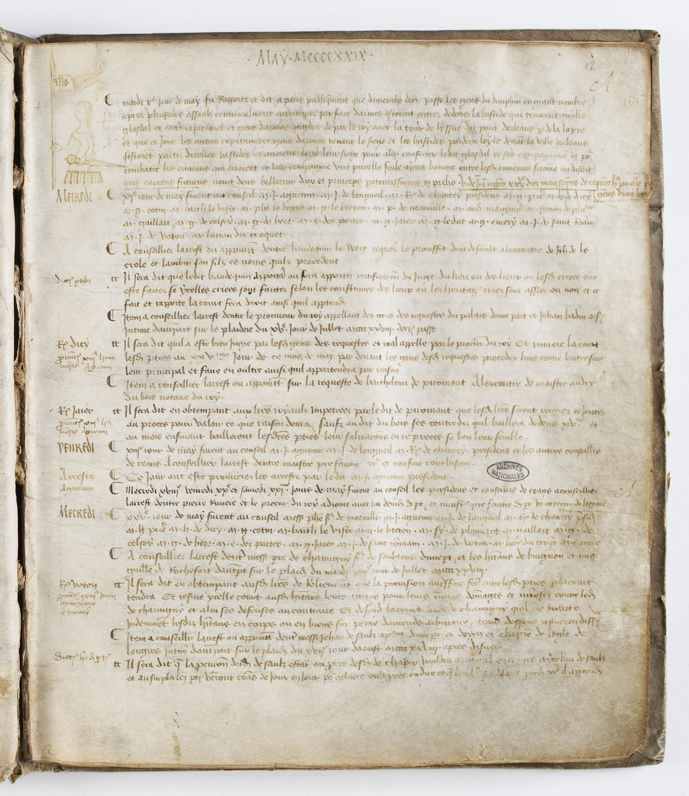 page comportant un portrait de Jeanne d'Arc